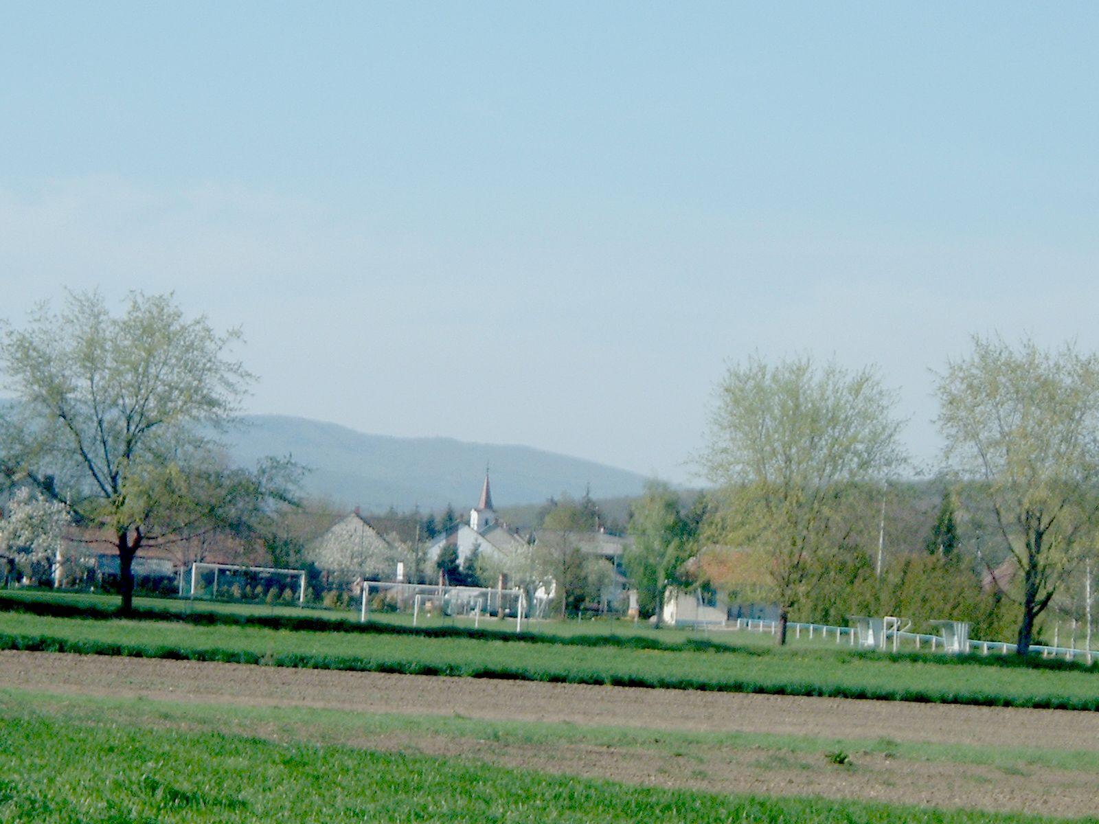 Bucsu, Hungary